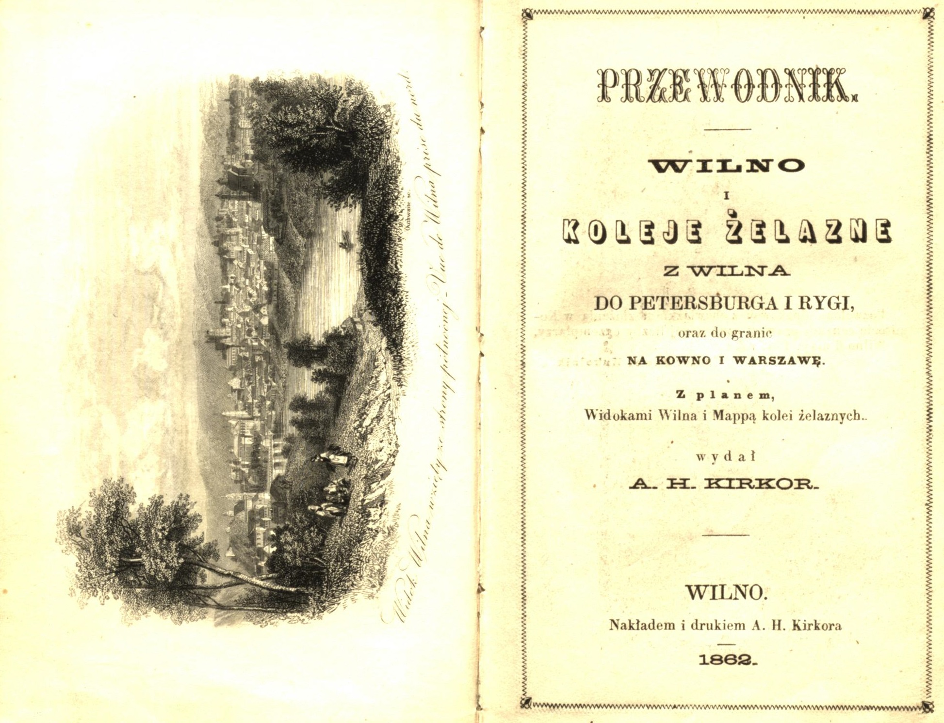 Z planem, widokami Wilna i Mappą kolei żelaznych.